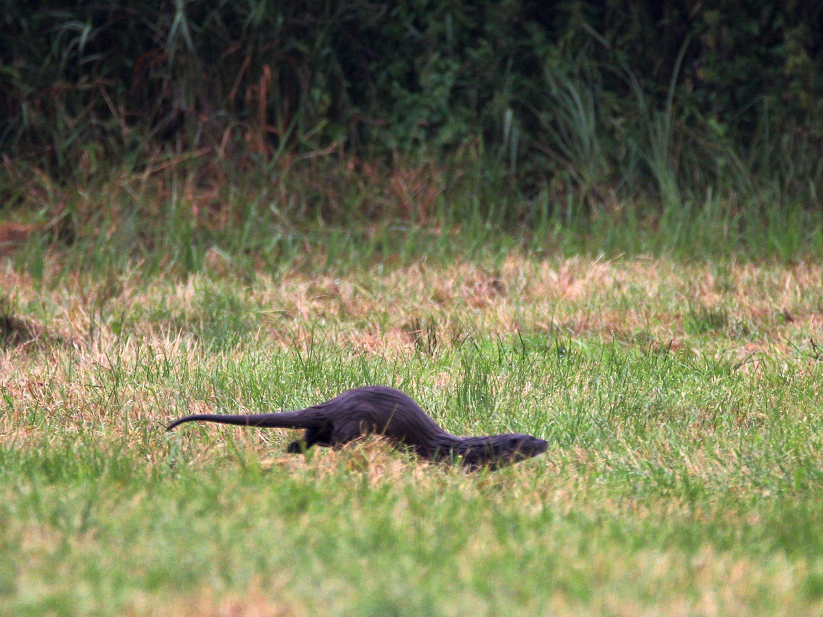 Otter in Mecklenburg